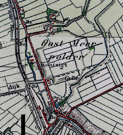 Oostemeerpolder